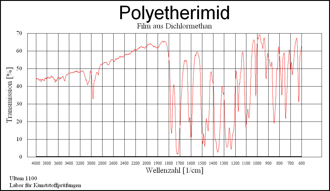 Infrarotspektrum von Polyetherimid (Ultem 1100)